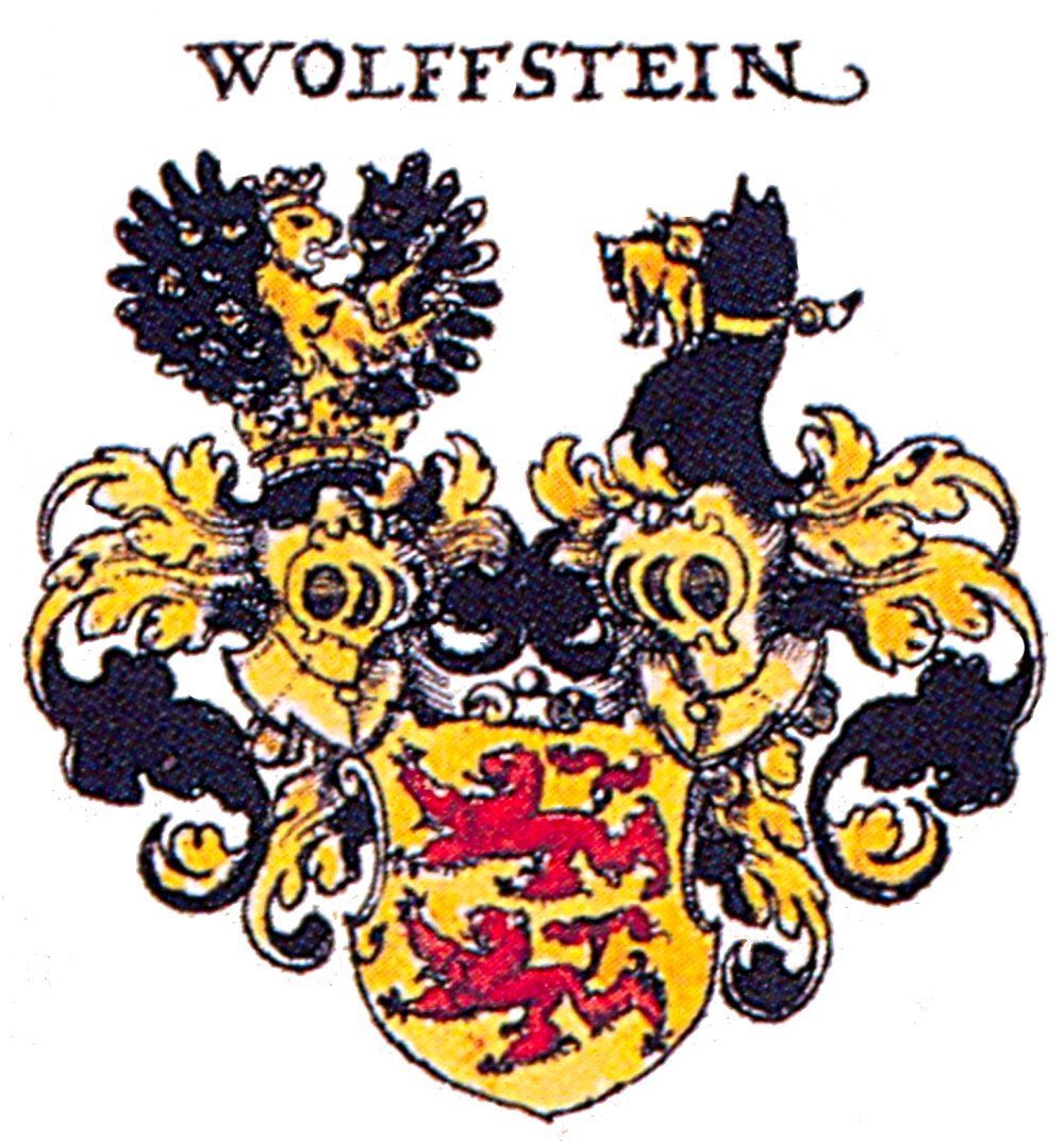 Wappen des Bayerischen und Fränkischen Adelsgeschlechts der Wolfstein - ab 1522 Freiherren - ab 1673 Reichsgrafen - 1740 erloschen